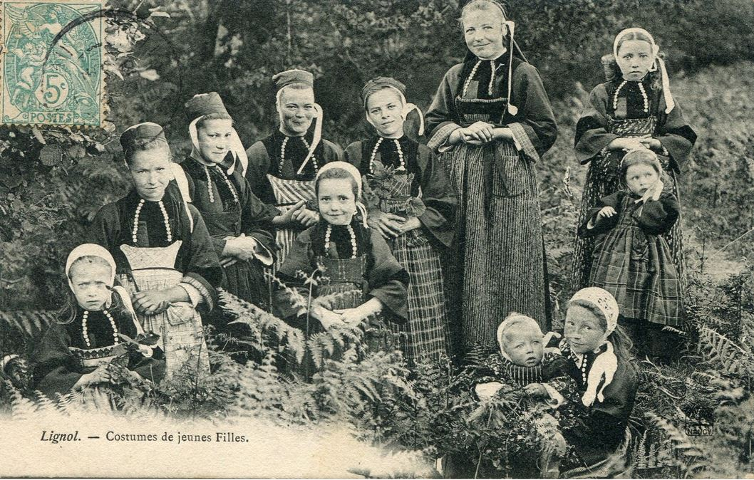 Carte postale du premier quart du XXe siècle. Groupe de jeunes filles de Lignol portant le costume du Pays Pourlet.